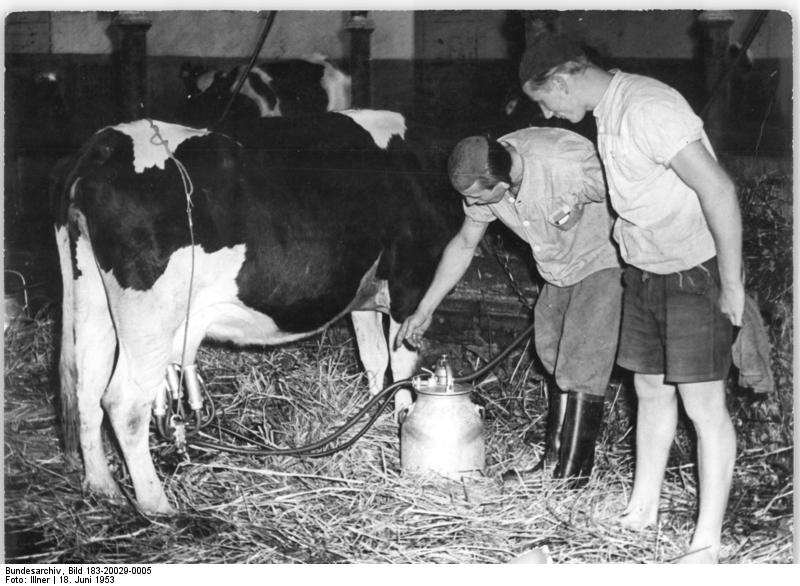 Priefel, Vorführung einer Melkmaschine Zentralbild Illner Kno-No. 18.6.1953 Sowjetische Melkanlage in volkseigenen Gut Priefel. Das volkseigene Gut Priefel im Kreis Altenburg verfügt über eine elektrische Melkanlage modernster Art, die der Betrieb aus der Sowjetunion erhalten hat. Melkermeister Rolli erklärt dazu: "Die Anlage übertrifft in der Sicherheit ihrer Betriebsweise und in der Einfachheit ihrer Konstruktion alle unsere Erwartungen. Während bei der früher in Deutschland gebräuchlichen Melkanlage durch das unnatürliche Zweitaktverfahren sehr oft Euterentzündungen entstanden und die Tiere sehr unruhig waren, ist gegen die aus der Sowjetunion gelieferte Anlage auch nicht der leiseste Einwand zu erheben." UBz: Der Melker Martin Müller zeigt dem Lehrling Jochen Müller, wie die sowjetische Melkanlage arbeitet.